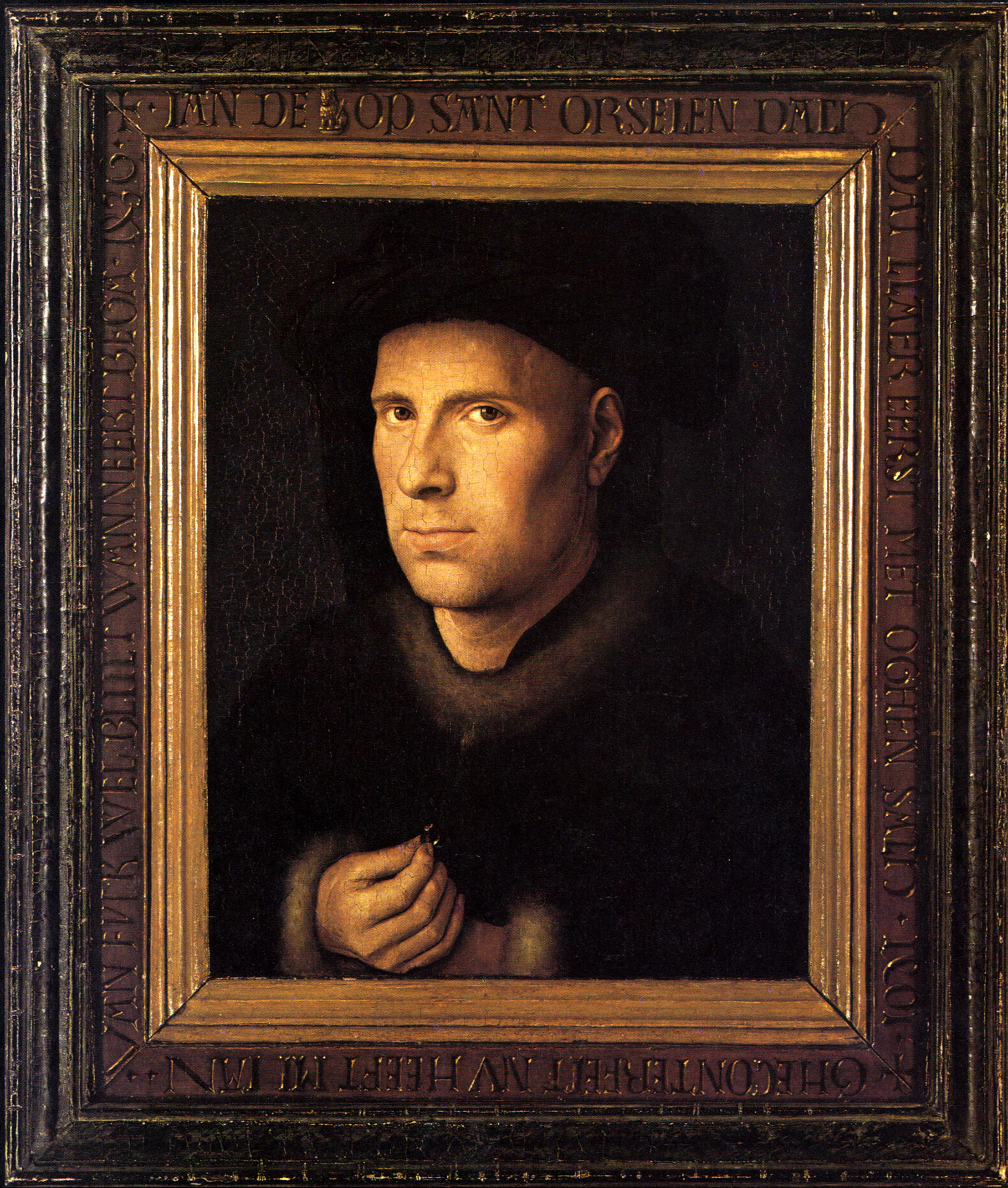 Portrait de Jan de Leeuw, avec son cadre orginal